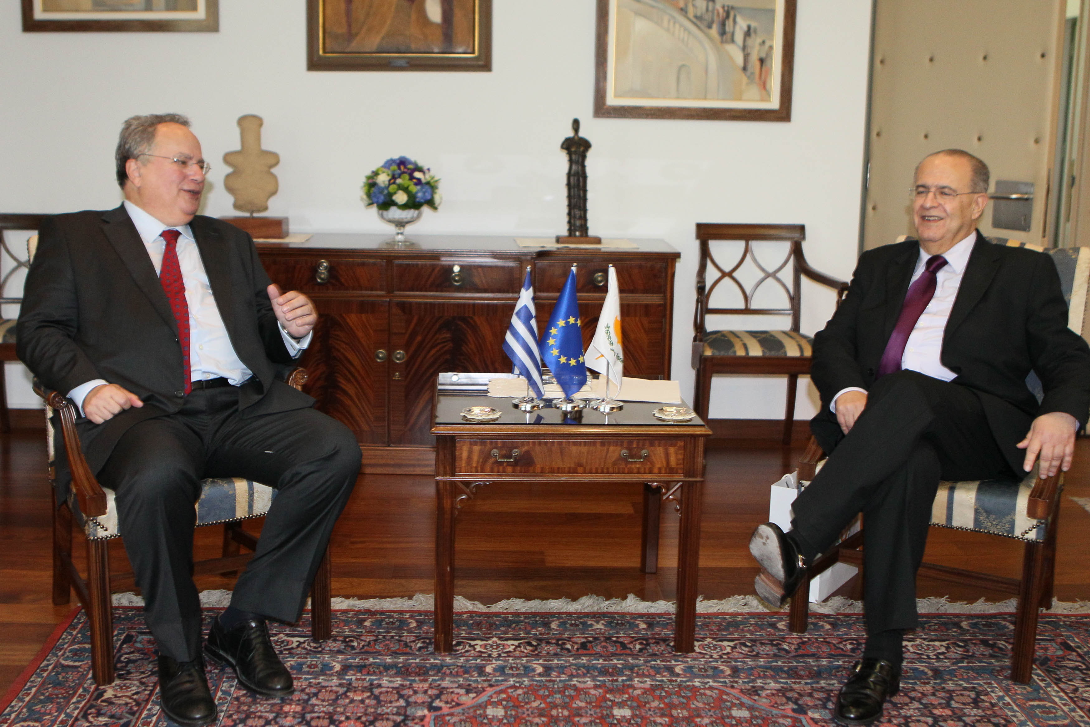 Συνάντηση με τον Υπουργό Εξωτερικών της Κυπριακής Δημοκρατίας, κ. Ιωάννη Κασουλίδη. Ο Υπουργός Εξωτερικών, κ. Νίκος Κοτζιάς, πραγματοποιεί την πρώτη του επίσημη επίσκεψη στο εξωτερικό κατά τη νέα του θητεία και θα μεταβεί, από τις 26 έως τις 28 Οκτωβρίου, στην Κυπριακή Δημοκρατία.